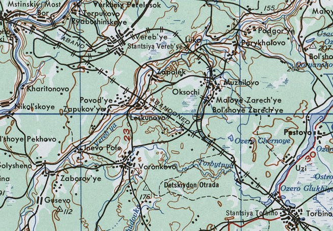 Часть листа из набора карт Восточной Европы Картографической военной службы США. Серия 501. 1954 Веребьинский обход Николаевской железной дороги. Масштаб 1:250 000